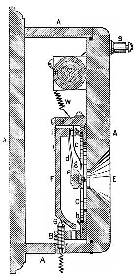 Motiv: Blakes Mikrophon (Querschnitt) Bearbeitung: Agon S. Buchholz (asb)